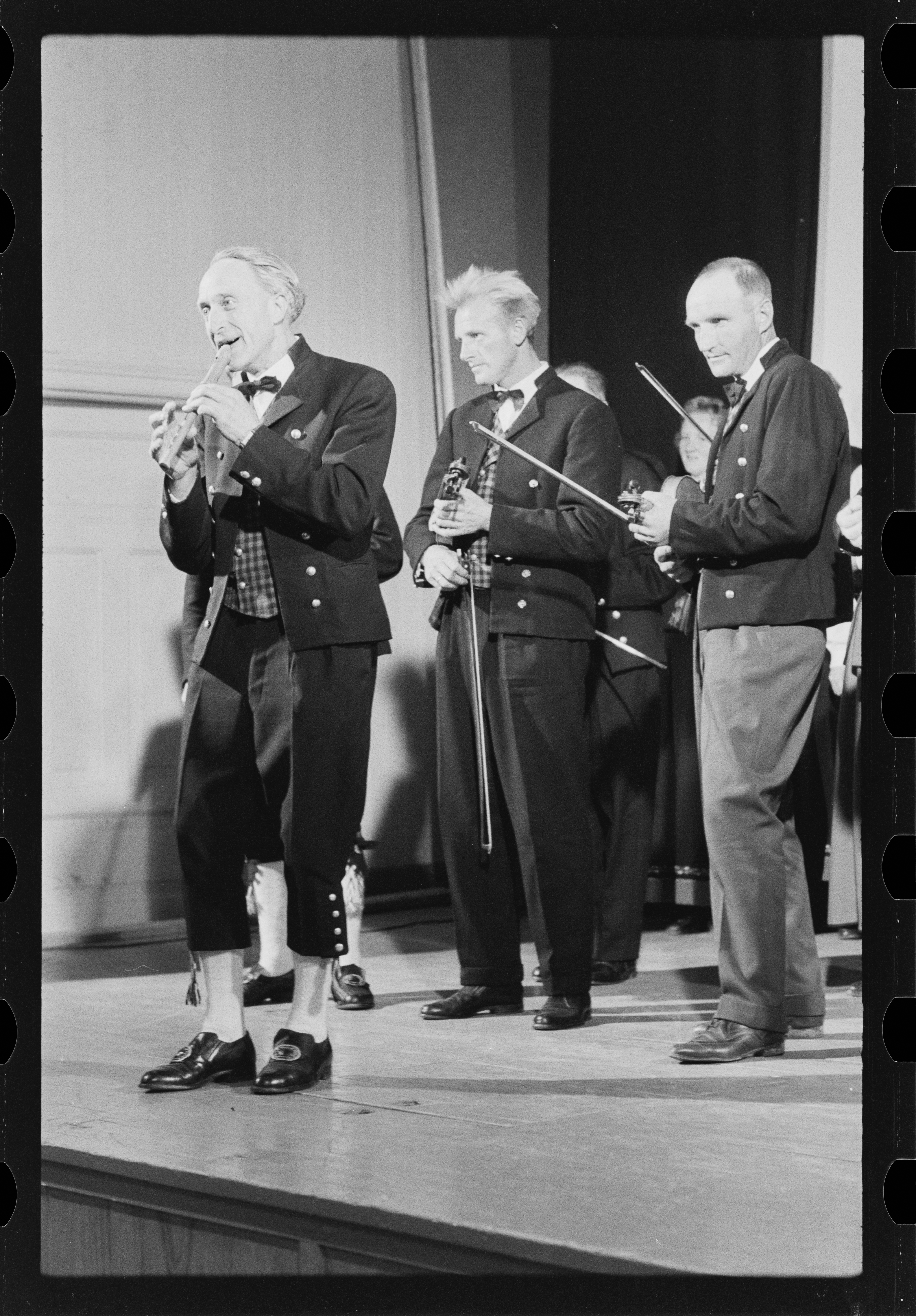 Bildet er hentet fra Arkivverket. Foto tatt i forbindelse med reportasje om den norske filmen Freske fraspark fra 1963. Manus var ved Kjell Aukrust og Bjørn Breigutu. Regi ved Bjørn Breigutu. Kjell Aukrust, Leif Juster, Turid Caldwell, Alfhild Hovdan, Per Bistrup, Lalla Carlsen Arkivinstitusjon : Riksarkivet Arkivnavn : Billedbladet NÅ Sted : Norge, Hedmark, Alvdal, Emneord: Film, Filminnspilling Avbildet